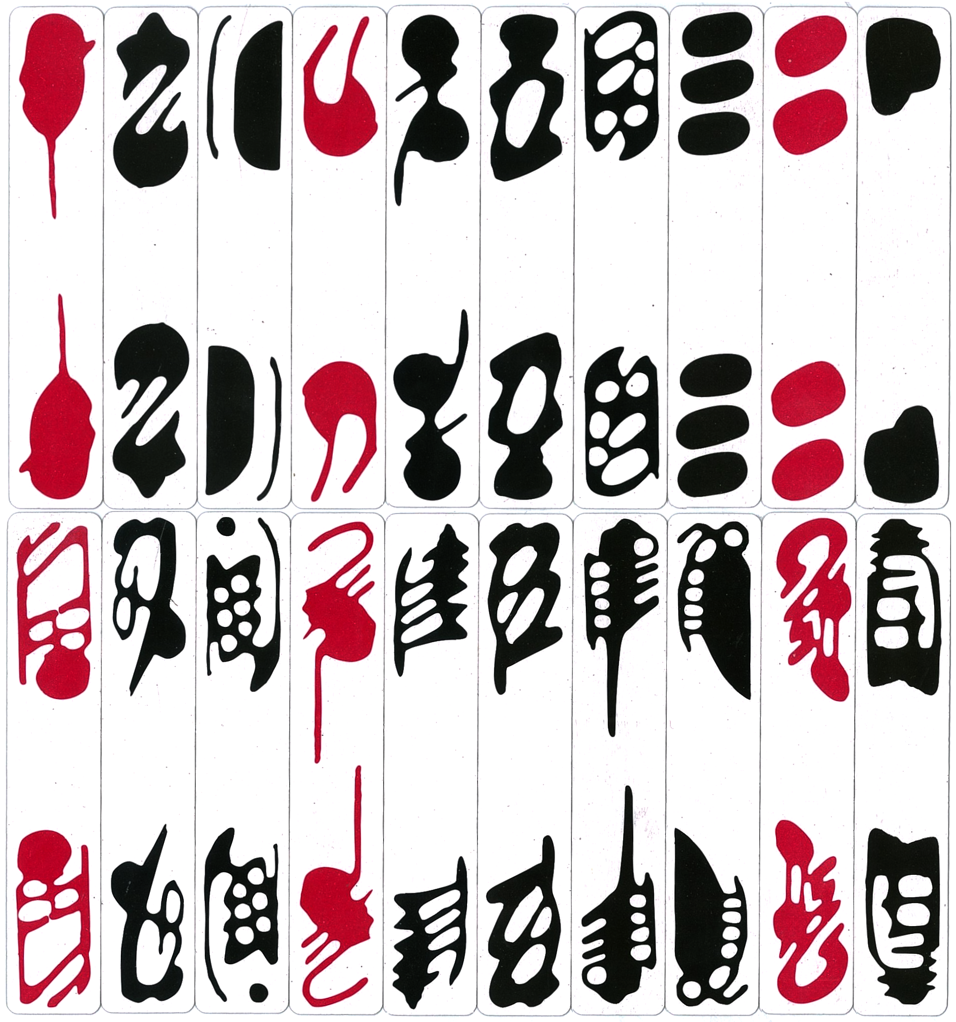 務川大貳牌